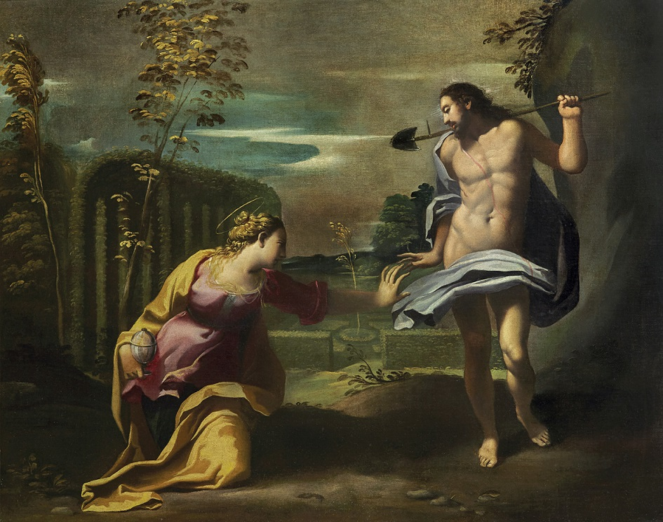 Noli me tangere, olio su tela, cm 69 x 91. Collezione privata